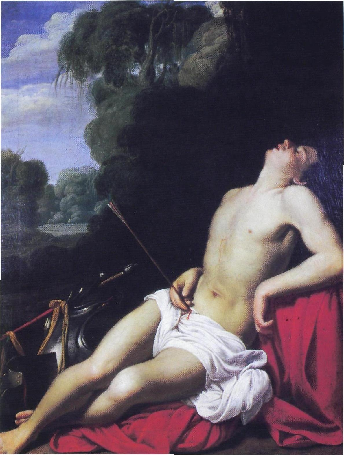 Saint Sebastian